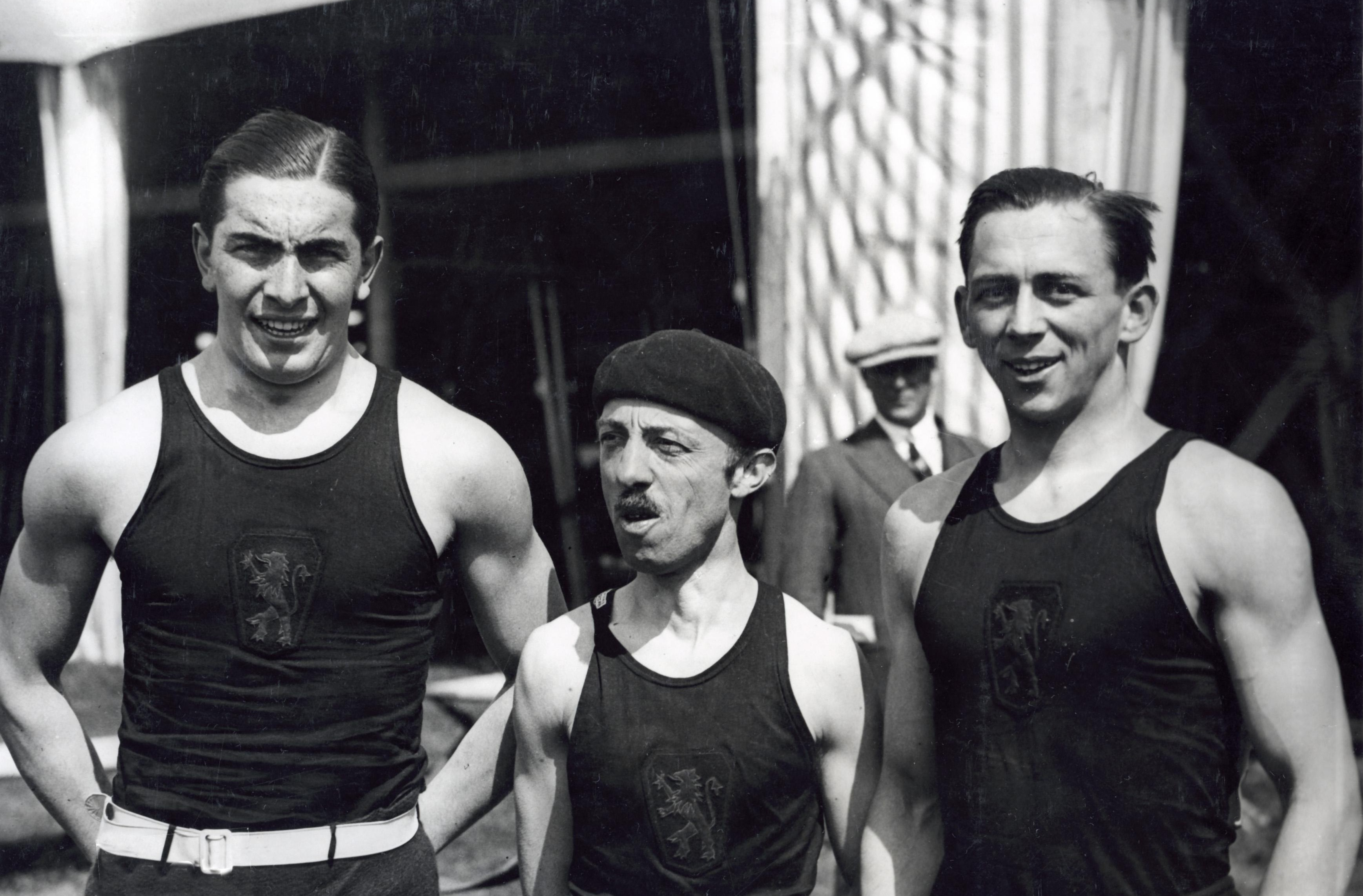 Sport, Olympische Spelen Amsterdam, Nederland, 1928: Roeien, twee met stuurman. Het Belgische team F. De Coninck, stuurman Anthony Degroef en L. Flament.